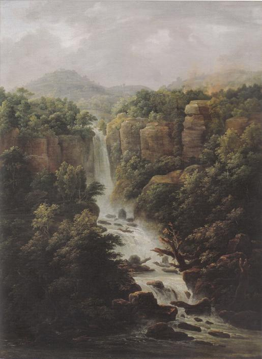 Каскады папского дворца в окрестностях Рима. 1818. Холст, масло. 97 х 73 Нижегородский государственный художественный музей.